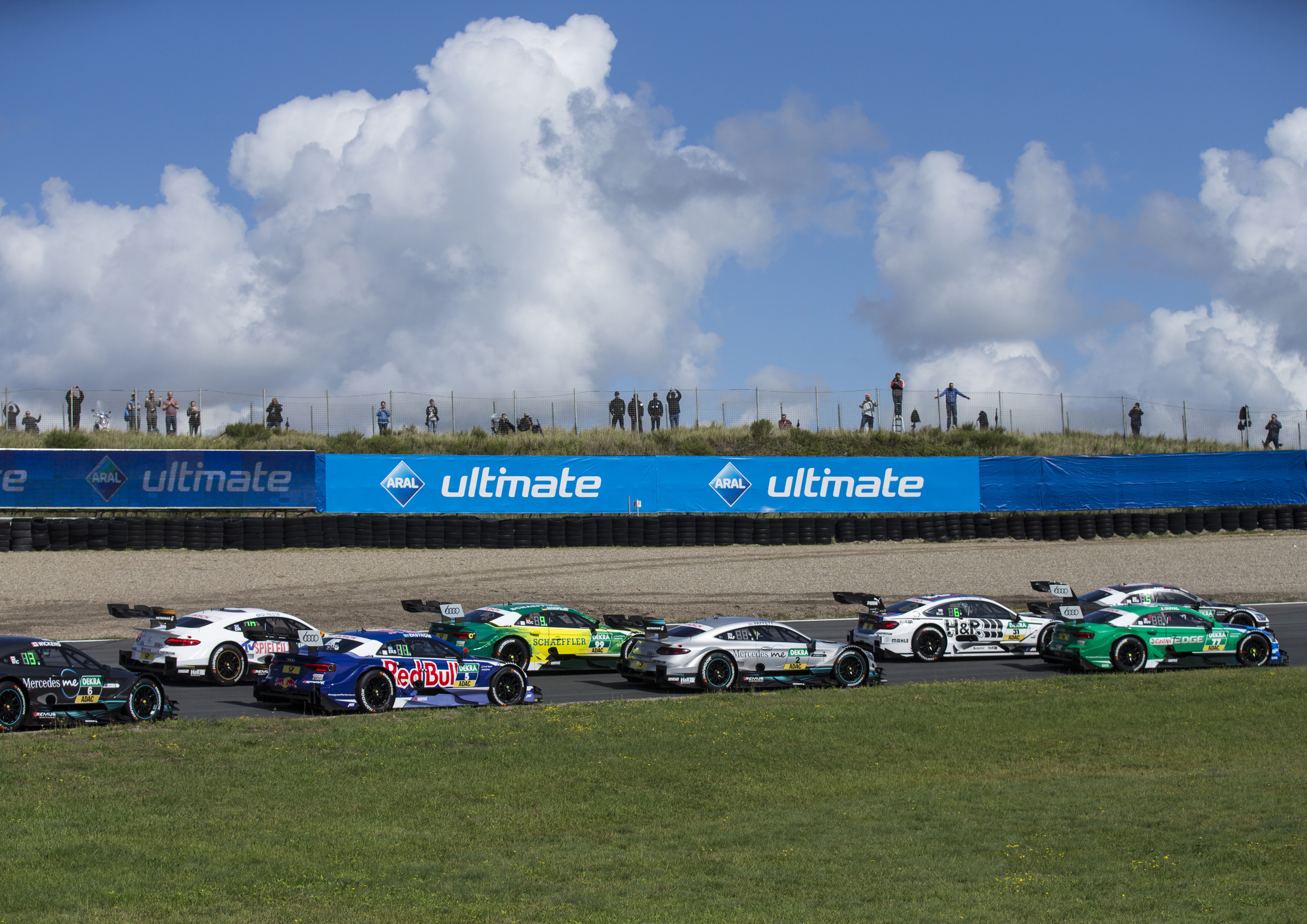 Mattias Ekström, Red Bull Audi RS 5 DTM, DTM Zandvoort 2017